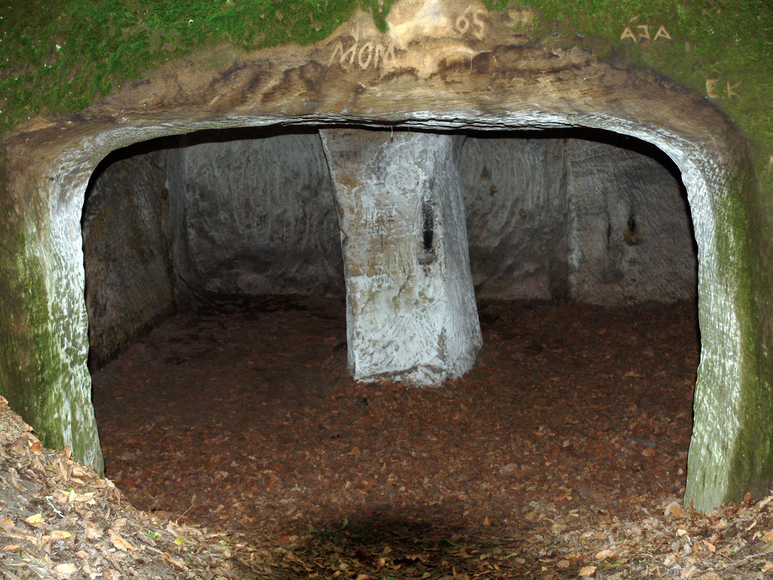 Tesané světničky skalního hrádku Hynšta